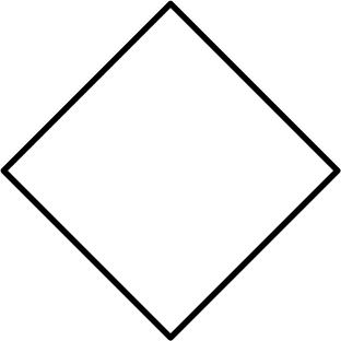 Funktionszeichen Truppmann